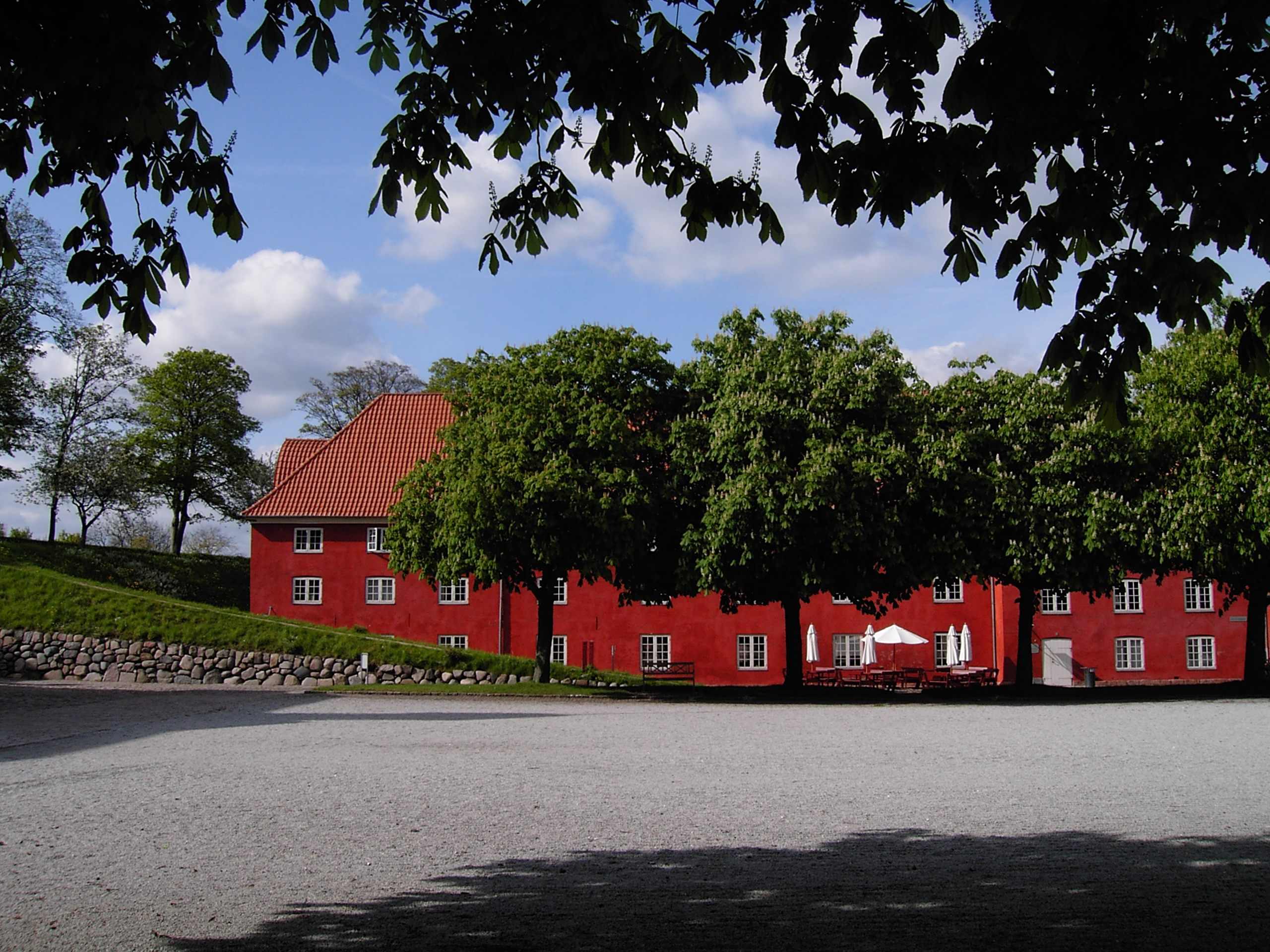 Storage building (Magasin) at Kastellet in Copenhagen, Denmark